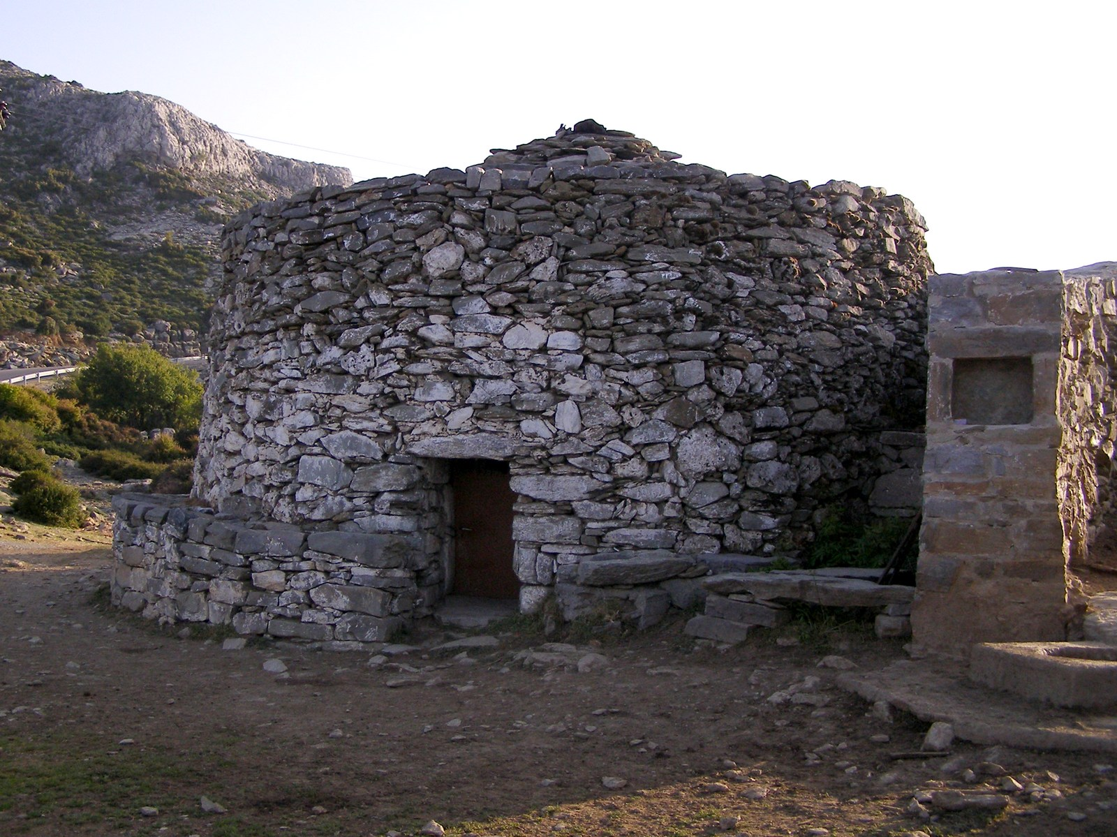 Ein Mitato nahe der Nida-Hochebene auf Kreta